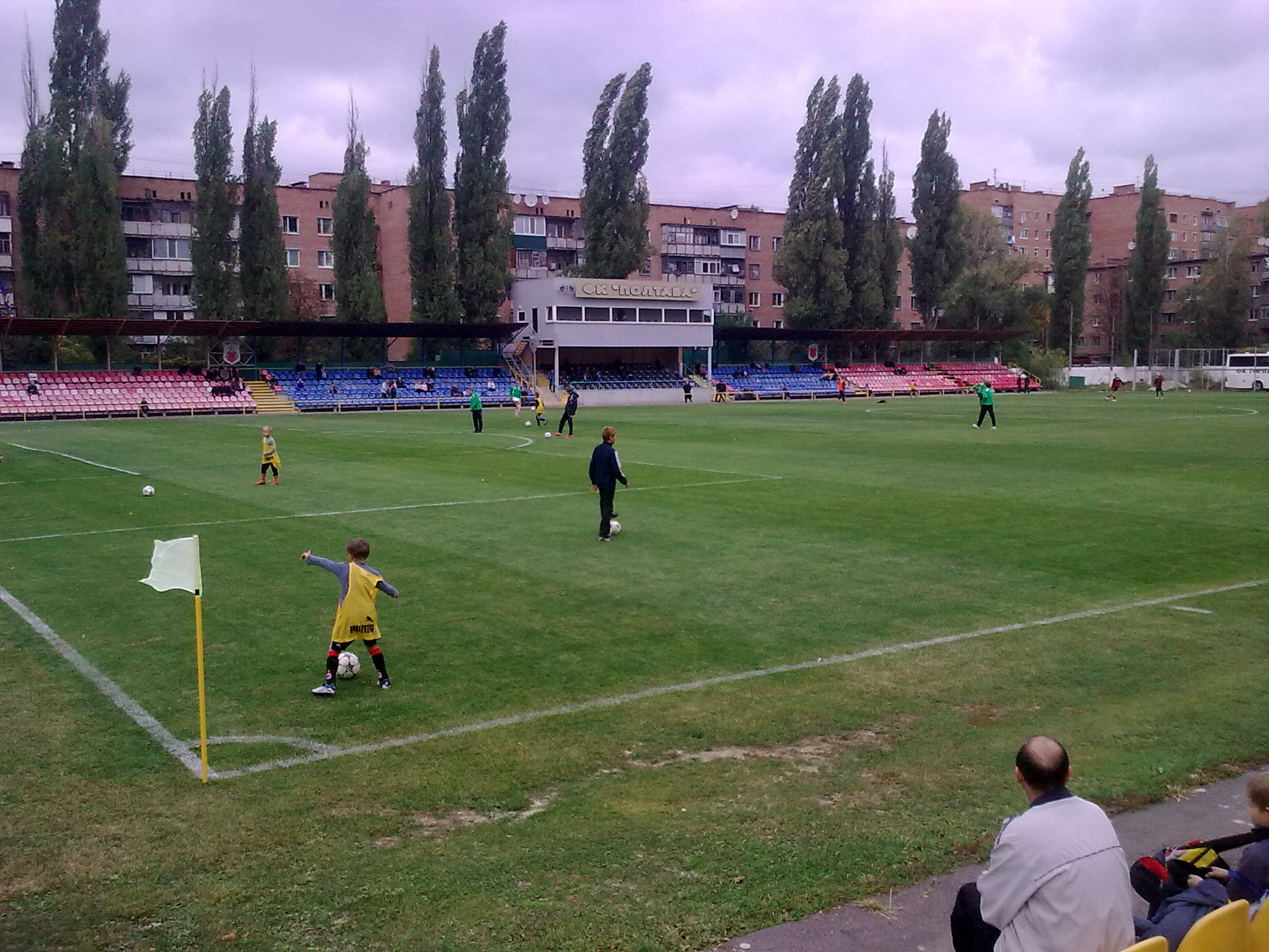 Локомотив 2011